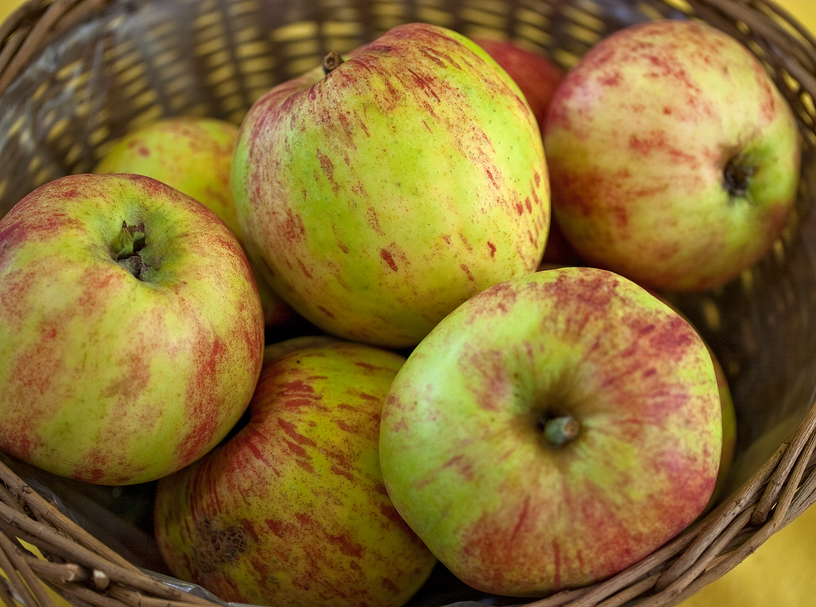 Der Gravensteiner ist eine Apfelsorte